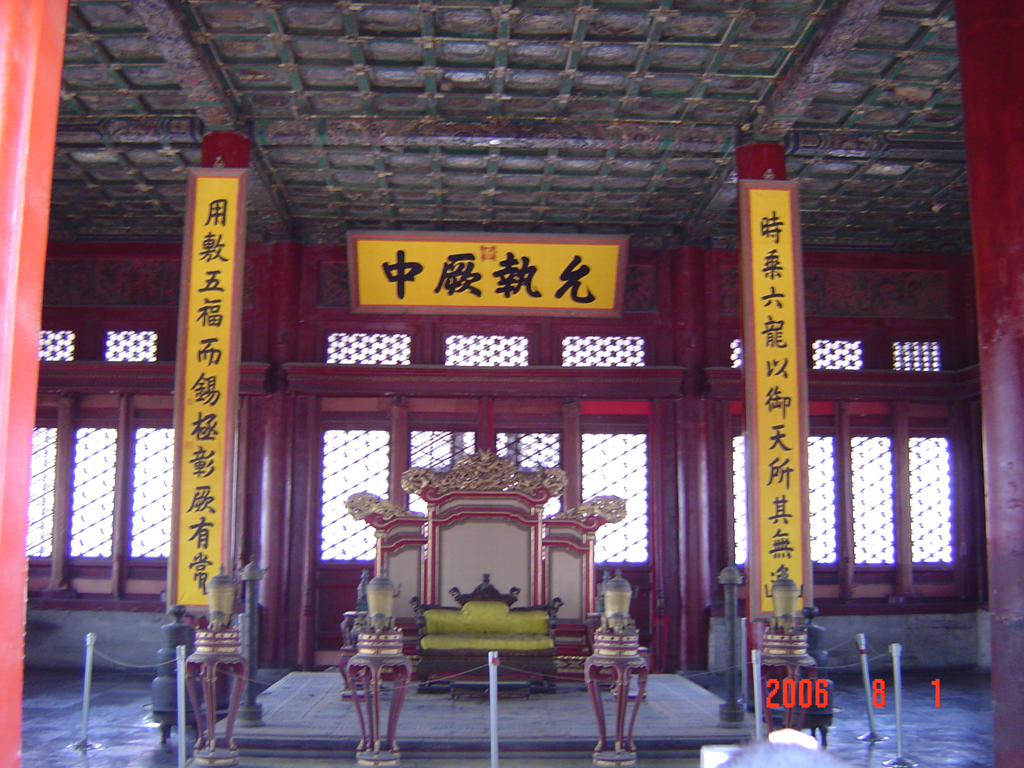 中和殿內御座。